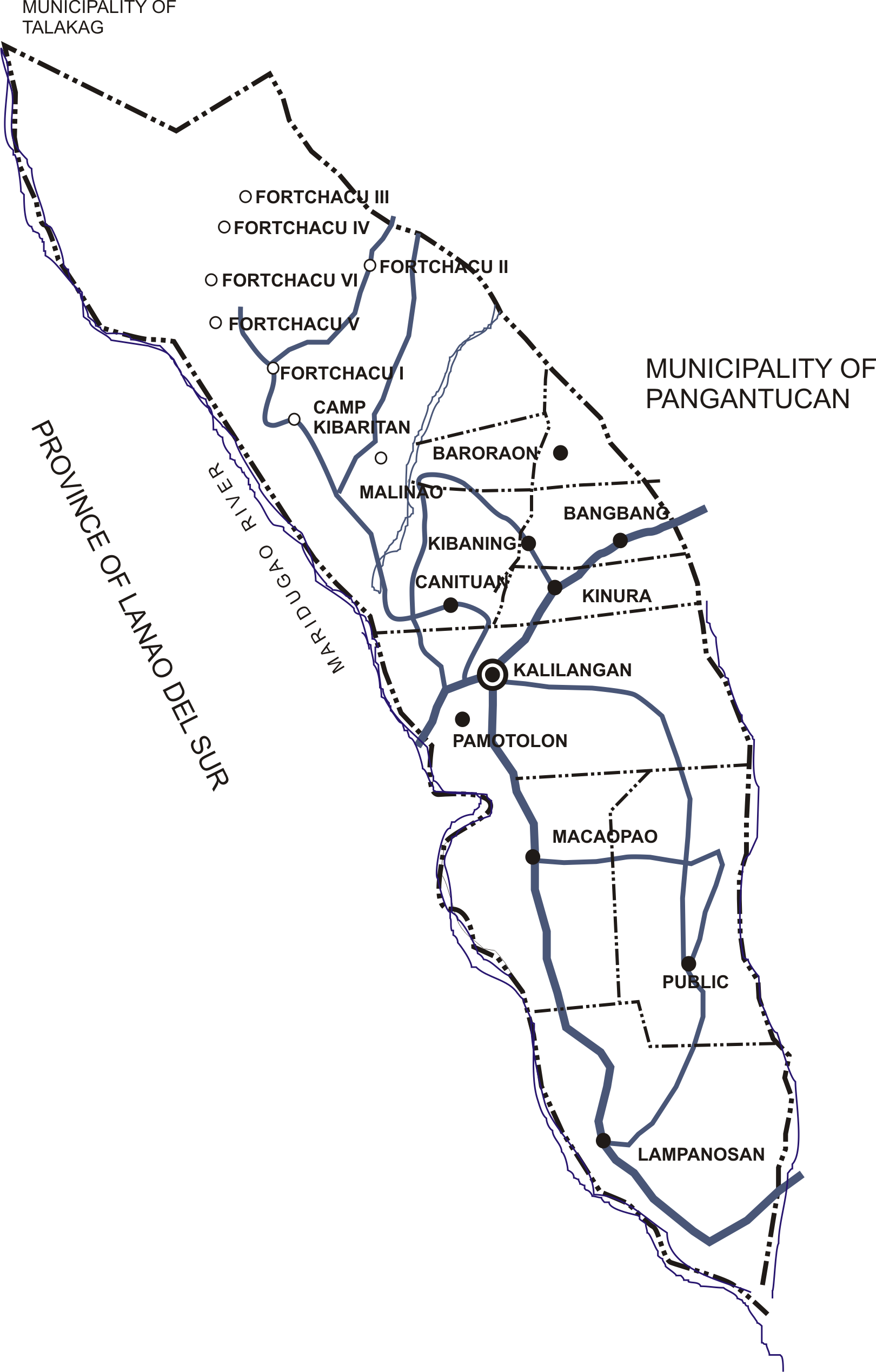 Political map of Kalilangan, Bukidnon